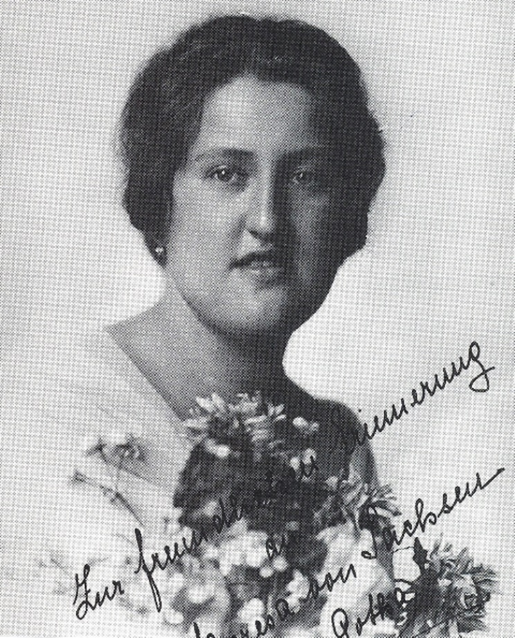 Princesa Teresa Cristina de Saxe-Coburgo e Bragança (1902-1990)